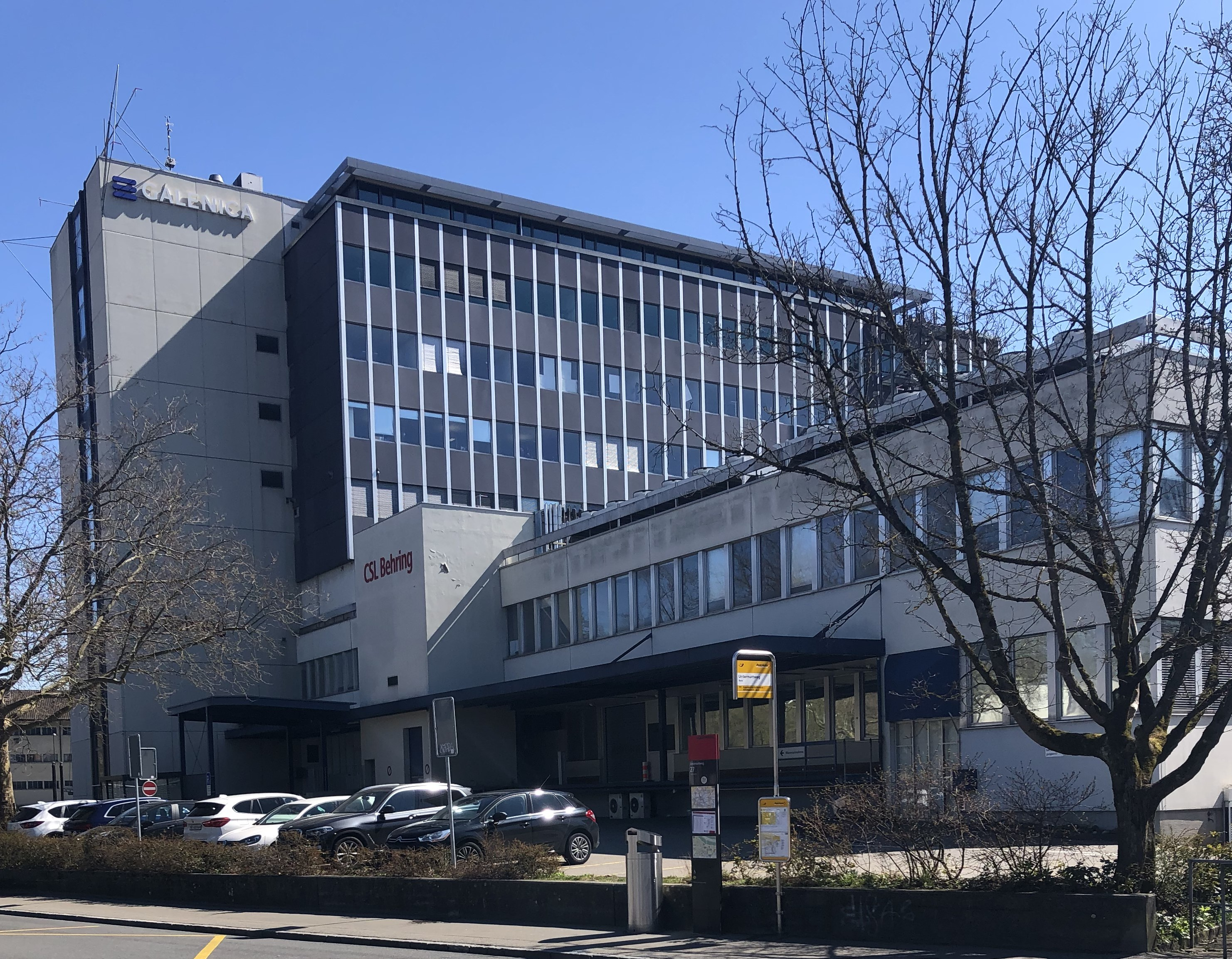 Untermatt Galenicahaus